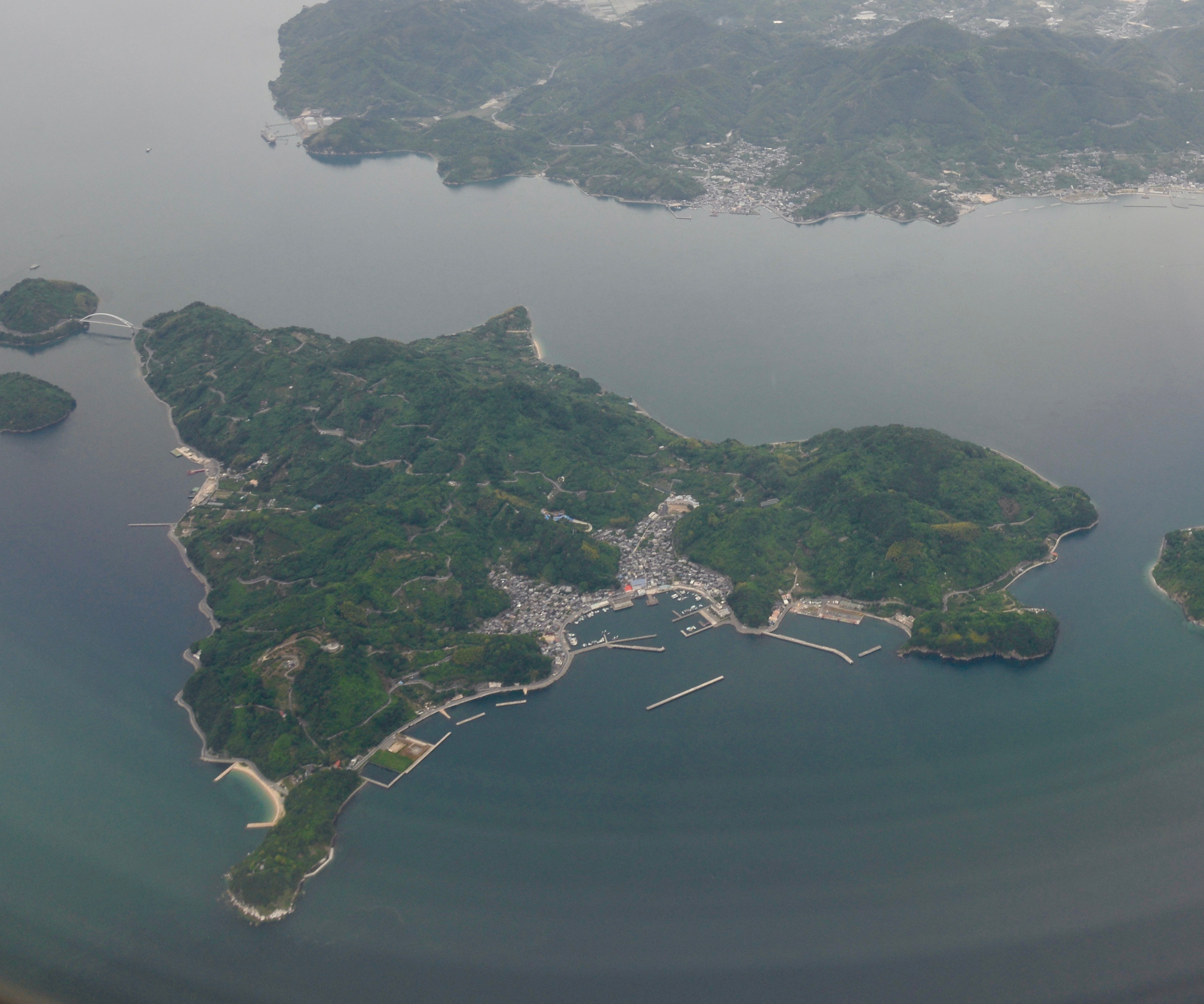 愛媛県今治市岡村島 松山空港へ向かう機内にて撮影